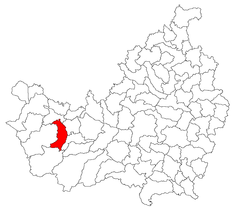 Categorie:Hărţi ale judeţului Cluj